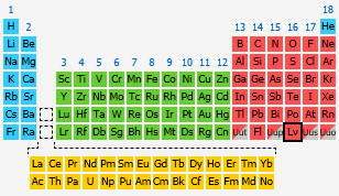 Gjendet në periodën e 7 dhe grupin e 16